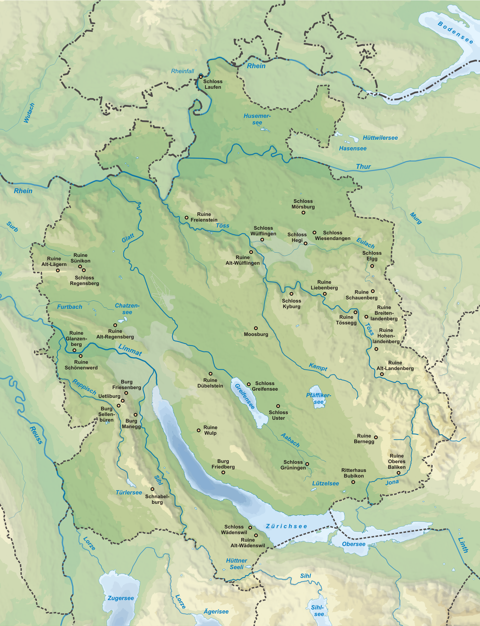 Karte der Burgen und Schlösser des Kanton Zürich. Topographischer Hintergrund: NASA Shuttle Radar Topography Mission (public domain). SRTM3 v.2.